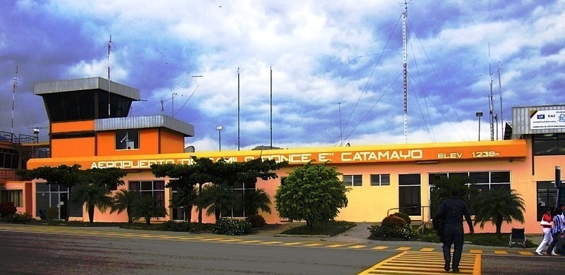 propio